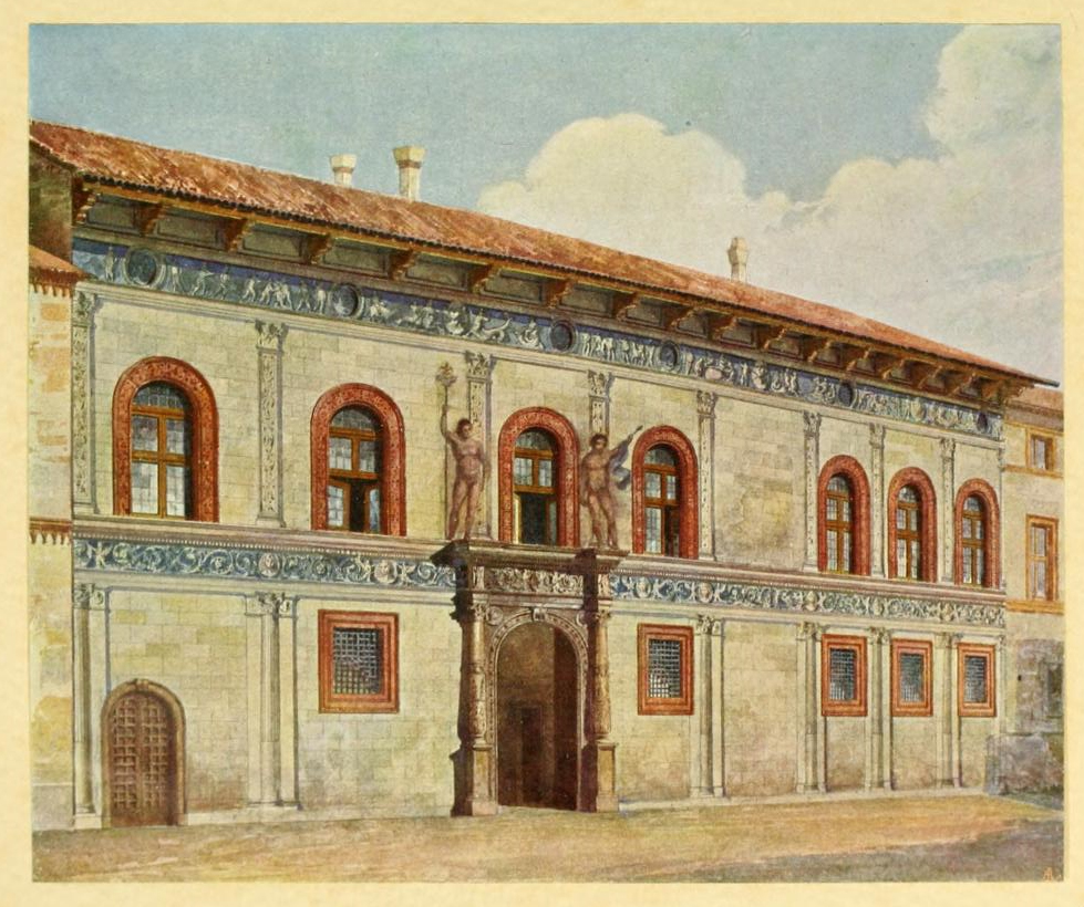 Casa Fontana-Silvestri (Milano) ricostruzione illustrata del 1915 tratta dal volume La corte di Lodovico il Moro di Malaguzzi Valeri, Francesco (1915, Hoepli, Milano)